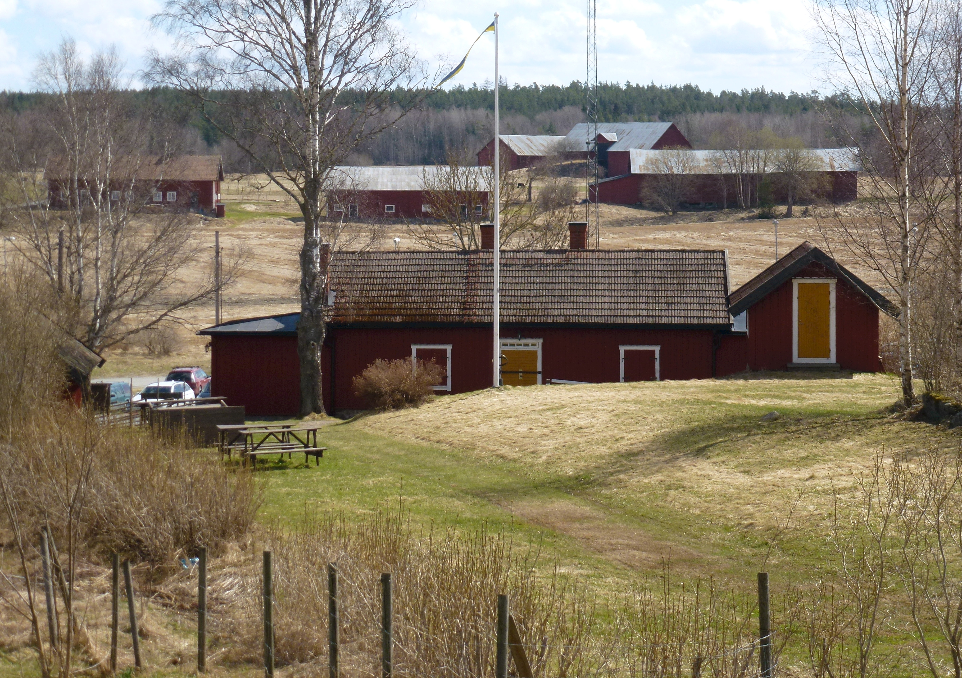 Brottby kvarn, kvarnstugan